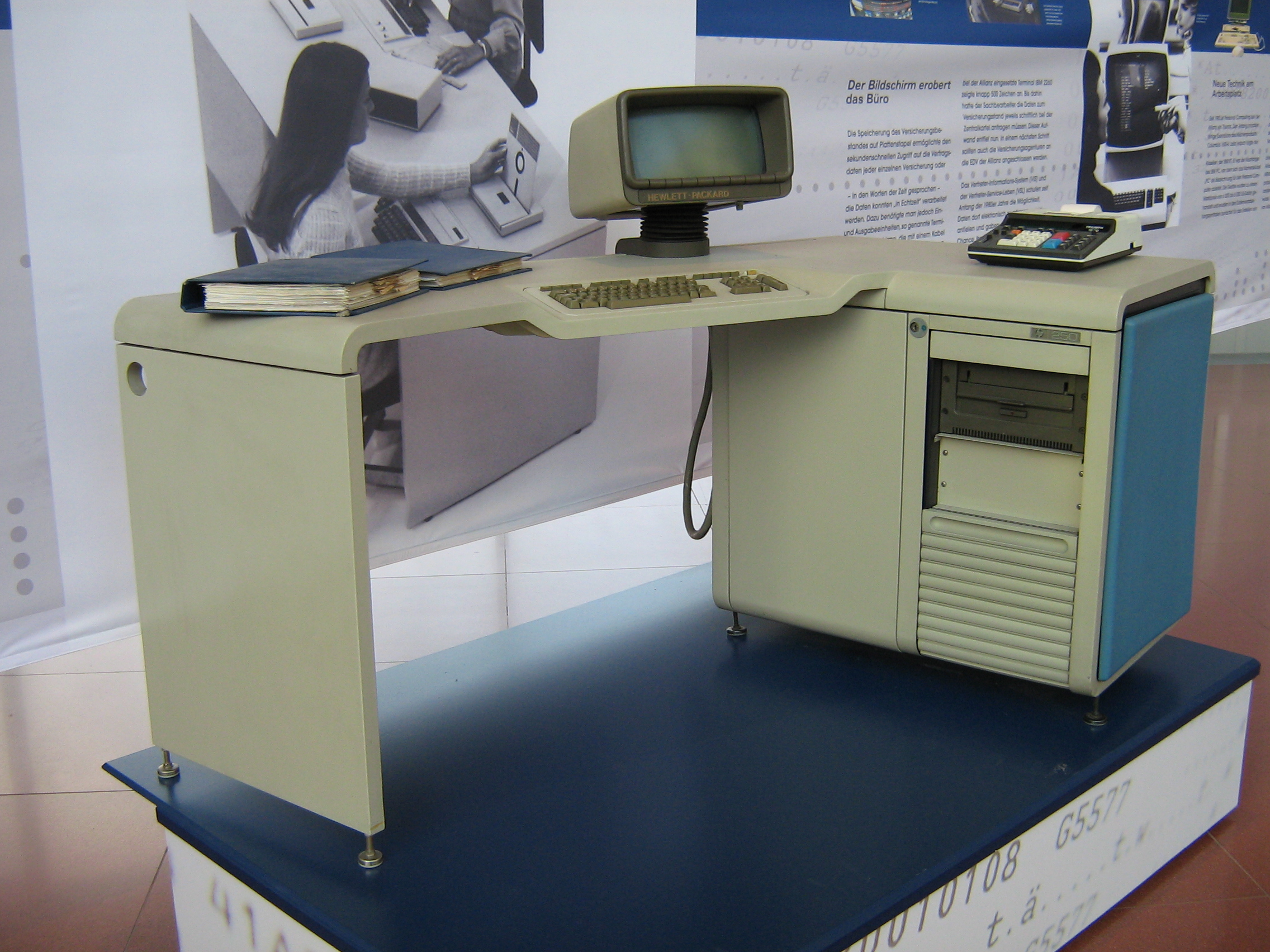 Hewlett-Packard 250 system